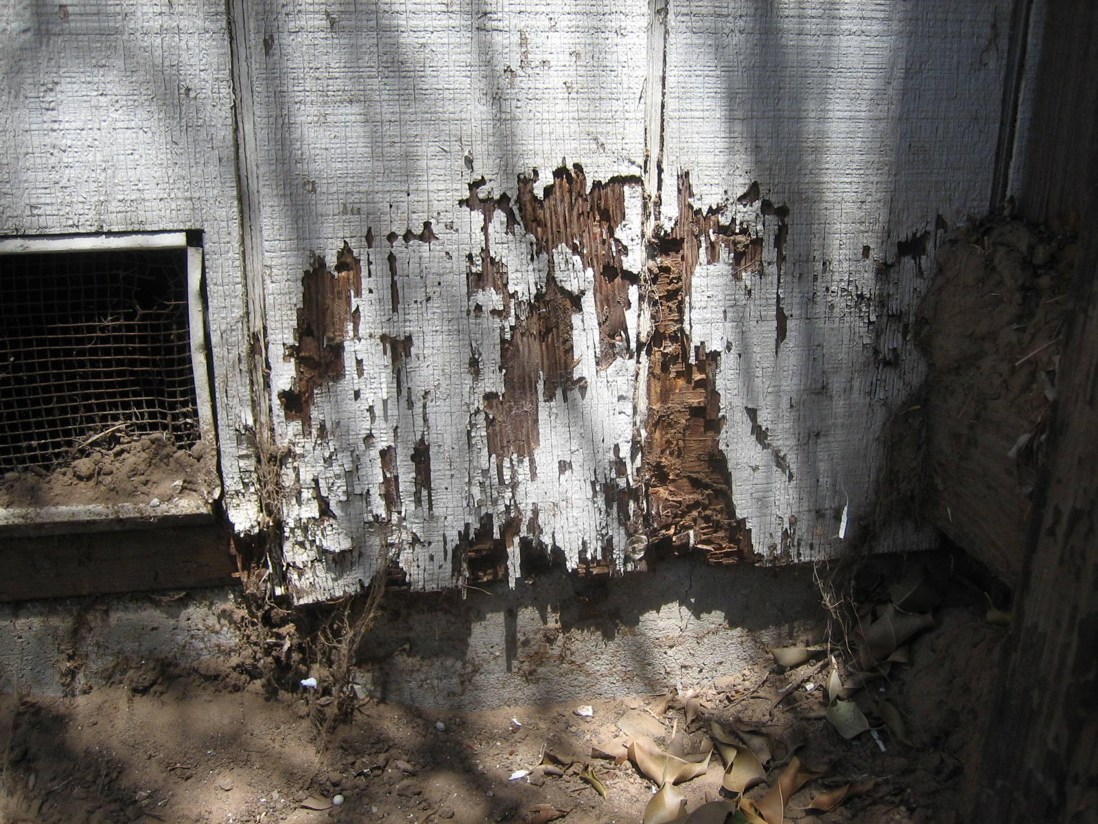 Termite damage to wood